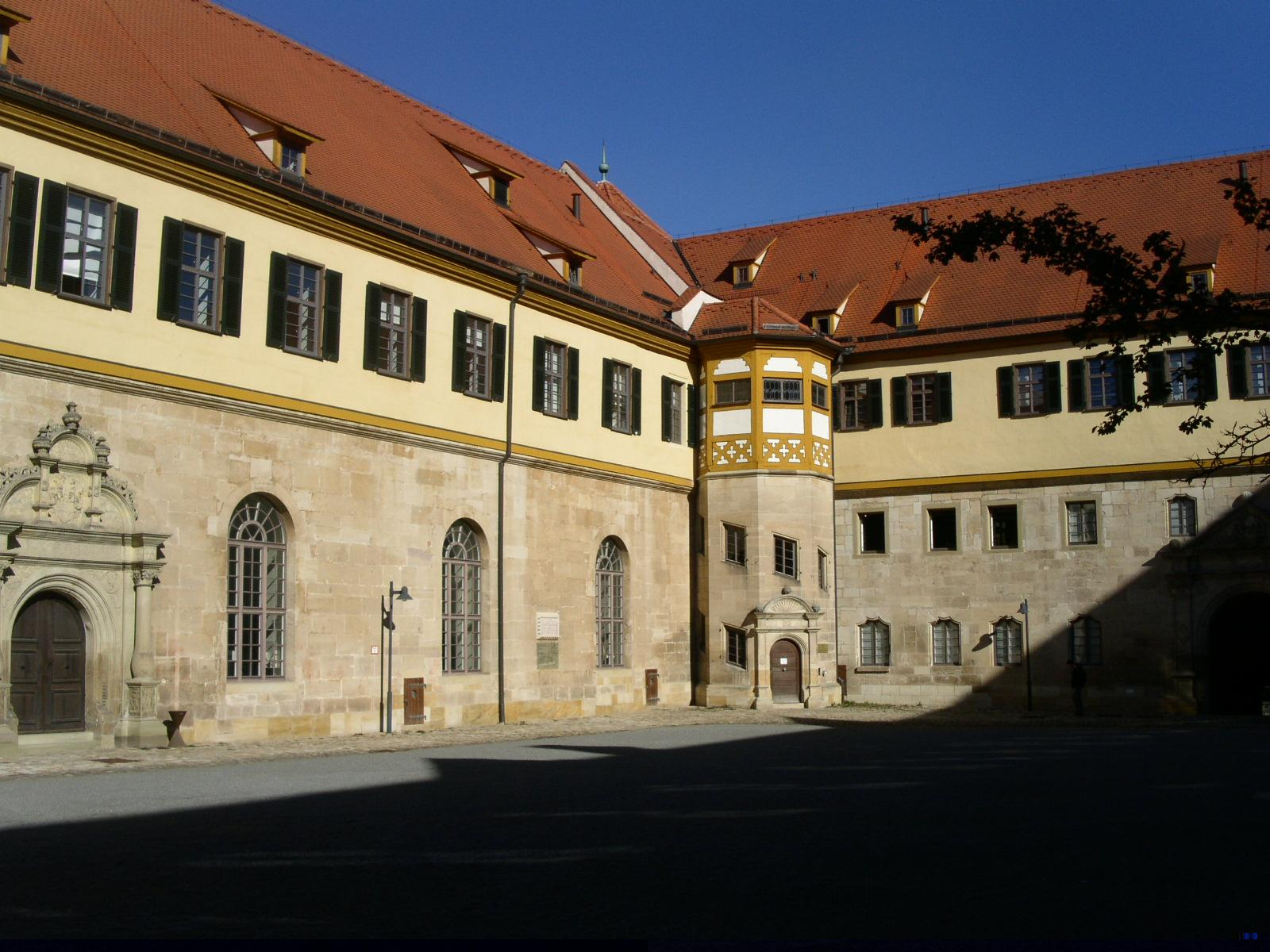 Schloss Hoehntübingen, Innenhof